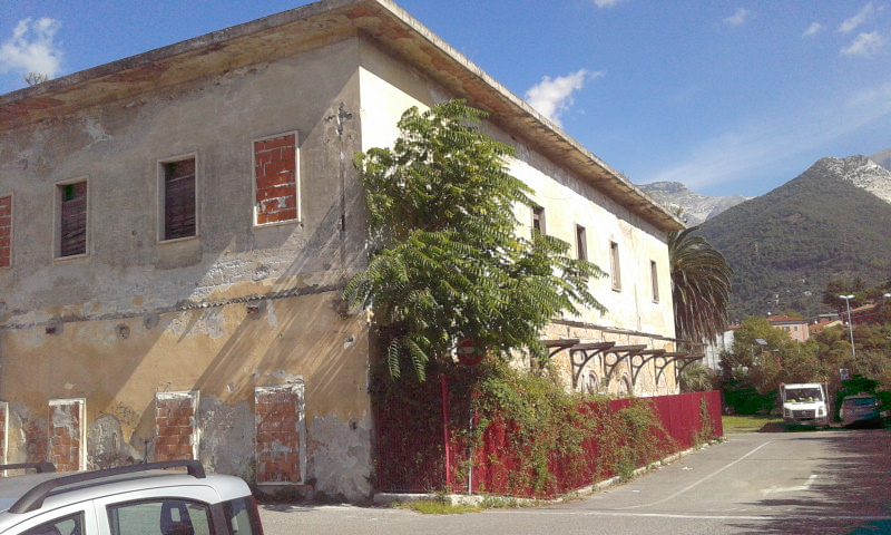 Veduta della dismessa stazione di Carrara-San Martino